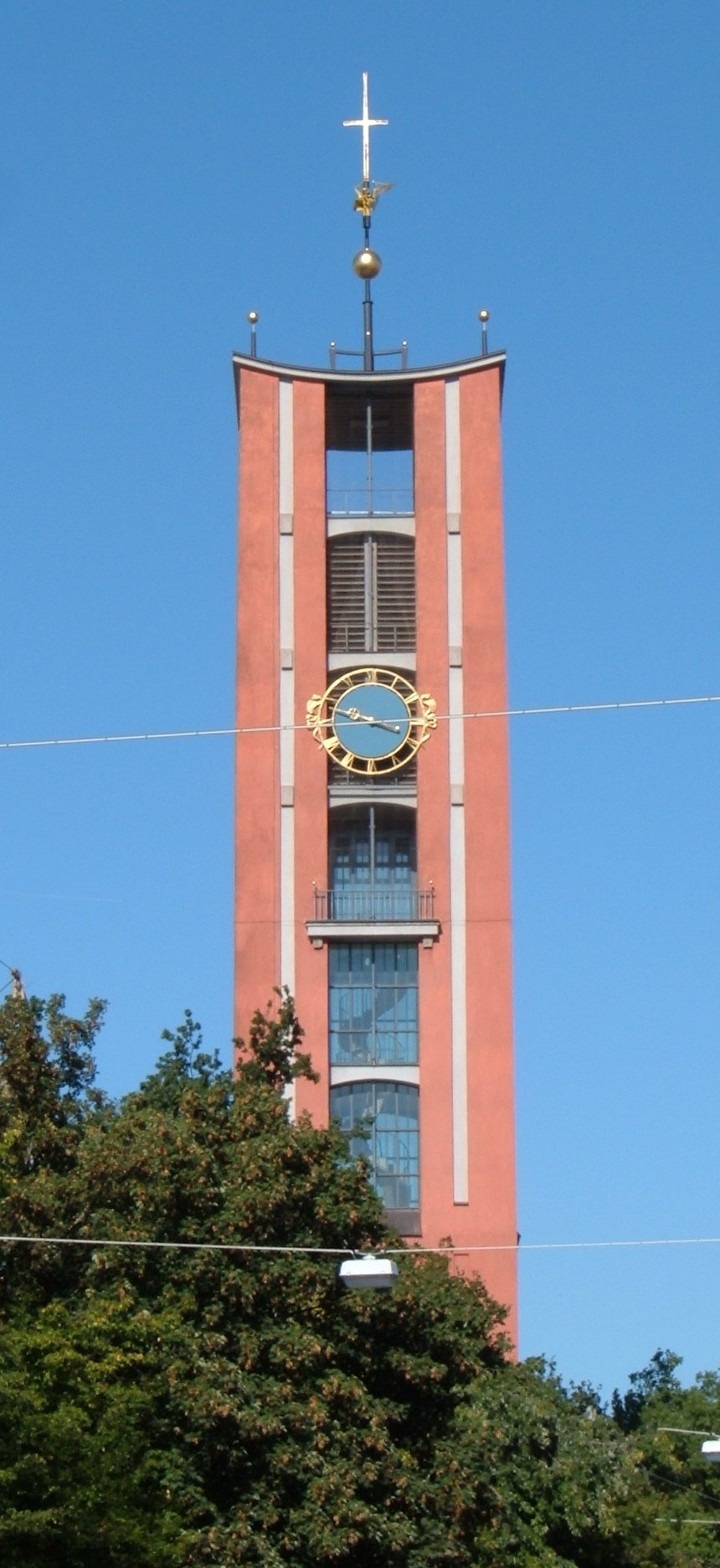 St. Matthäus